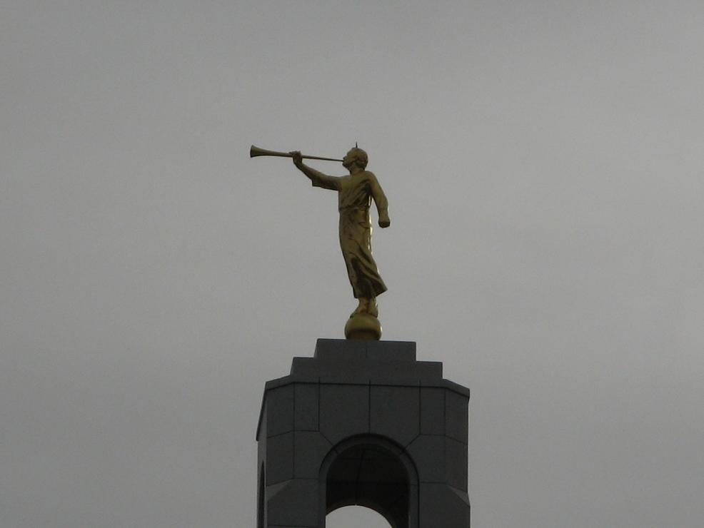 Templo de la IJSUD, Madrid, España